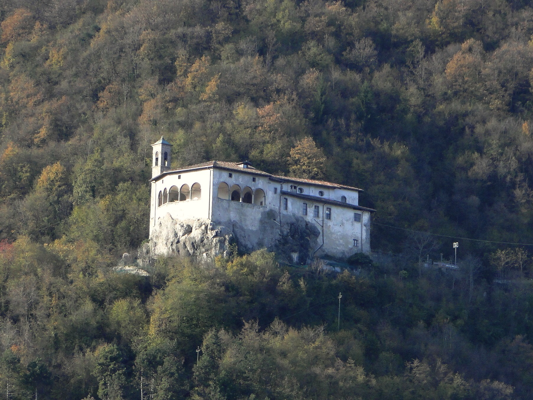 Santuario di san Patrizio. Colzate (BG)